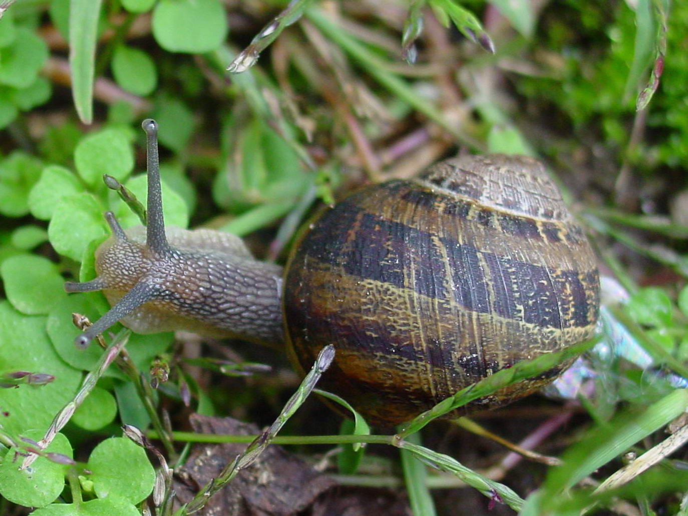 Foto realizada en Mandaio, Oza dos Ríos, Galicia Publish by= Luis Miguel Bugallo Sánchez. Self made